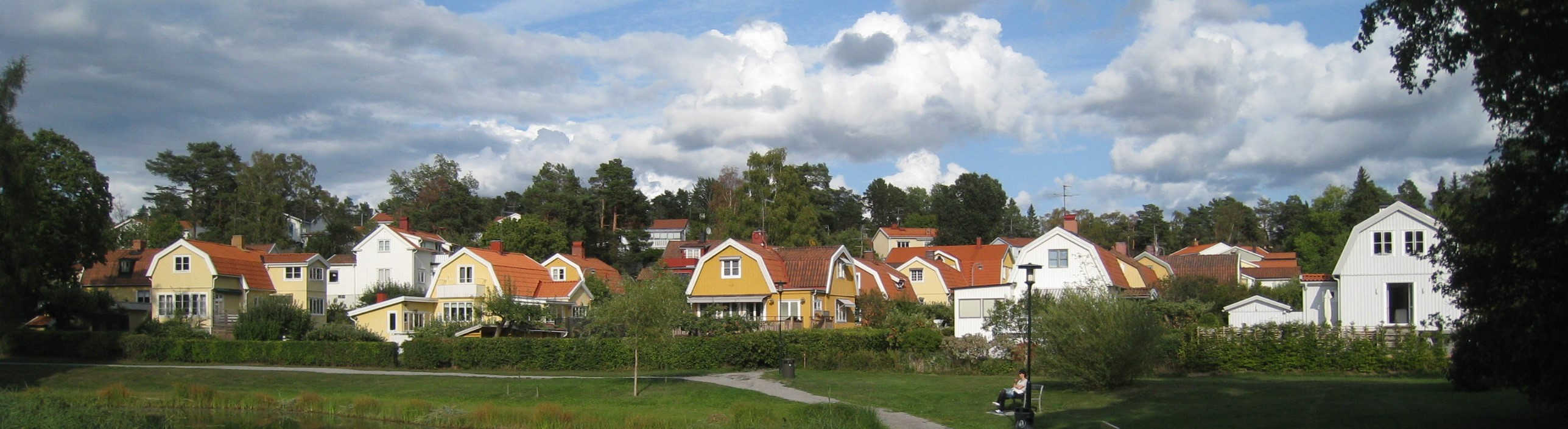 Stugvägen, Olovslund, Bromma. Villor i kv. Skåpet, vy från dammen.